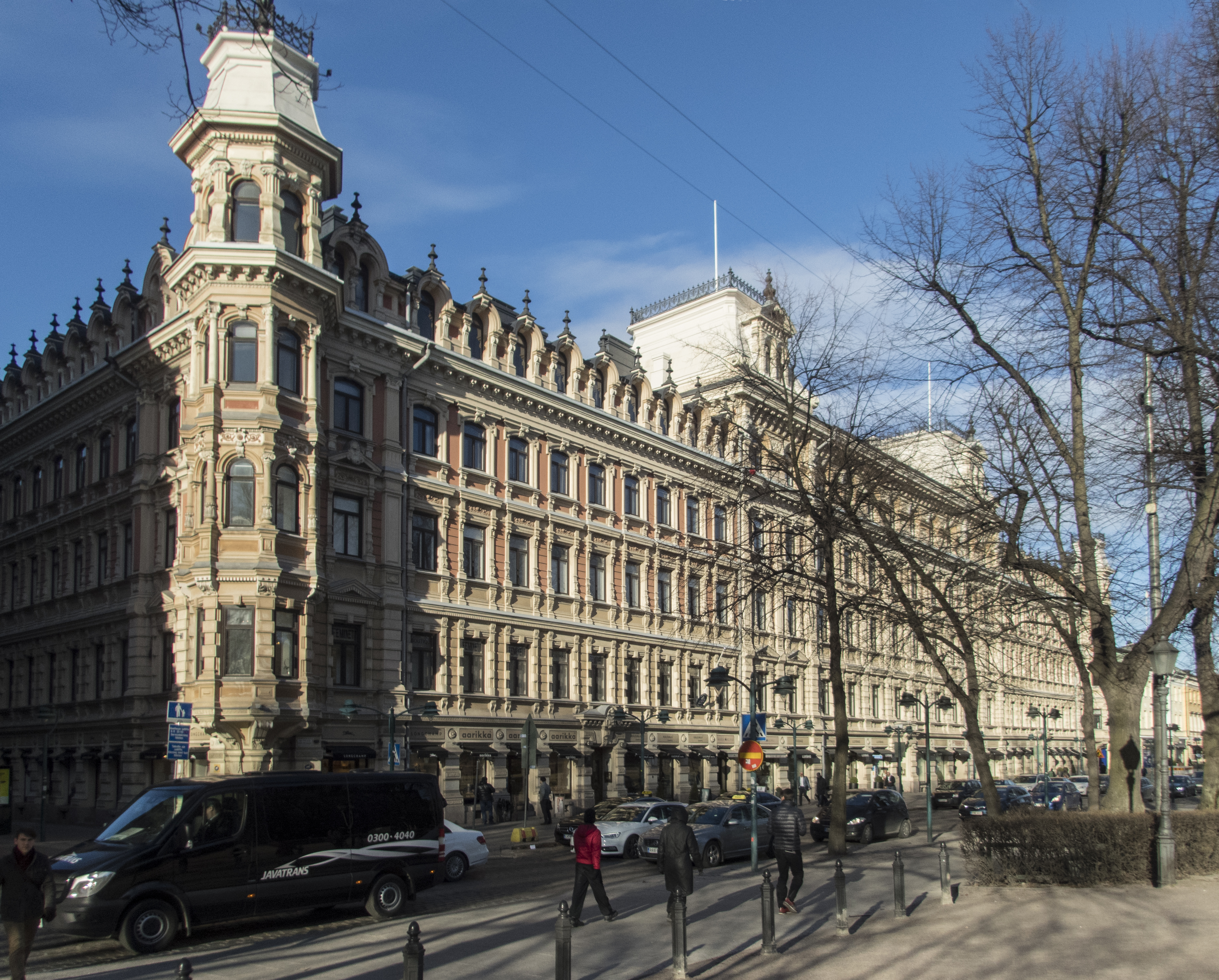 Grönqvistska huset, Norra Esplanaden 25-27, Helsingfors, Finland. - F.d. bostadshus är planerad av arkitekt Theodor Höijer och färdigställdes år 1883.